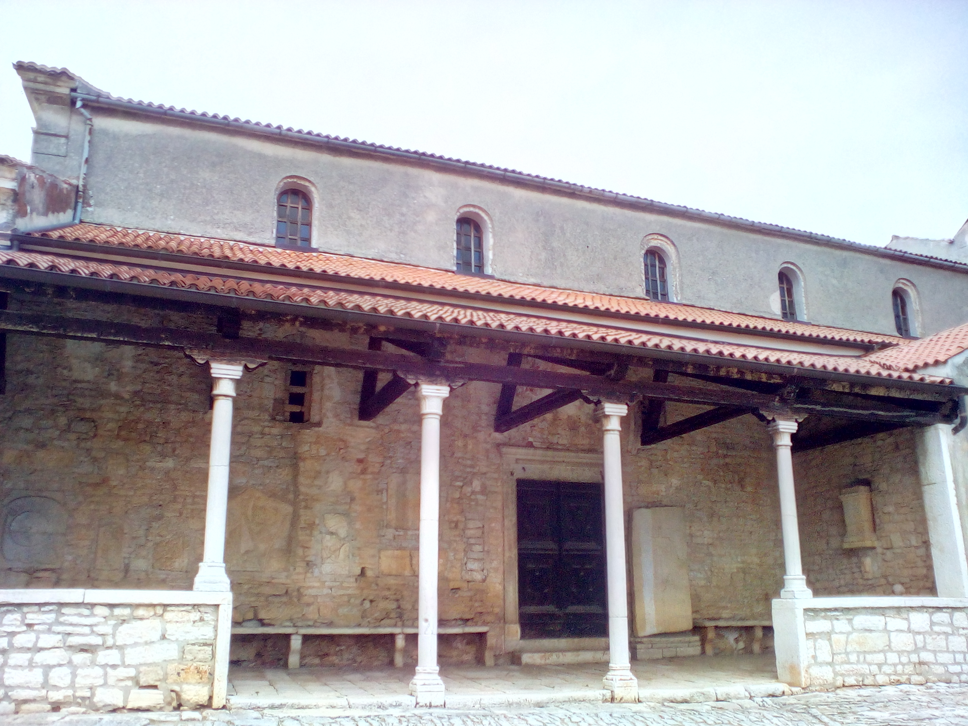 crkva sv. martina - gradska lođa